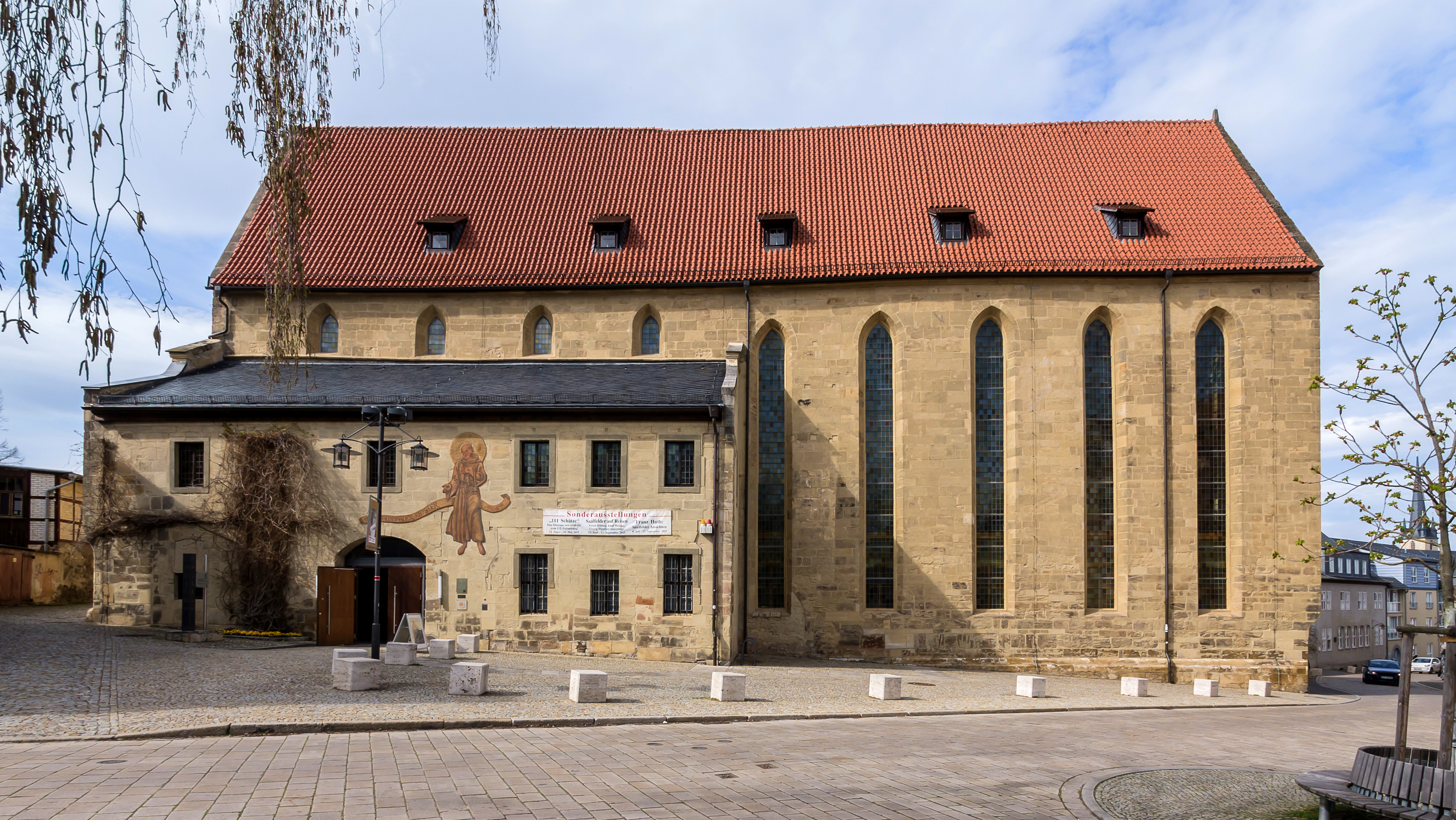 Saalfeld Münzplatz 5 Ehem. Franziskanerkloster,Bestandteil Denkmalensemble "Stadtkern Saalfeld-Saale"